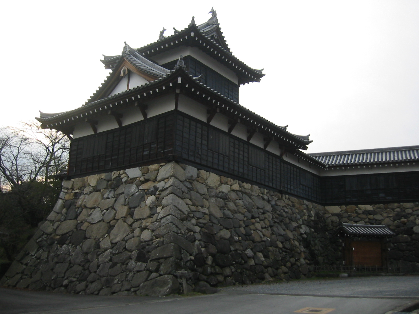 Kooriyama Castle